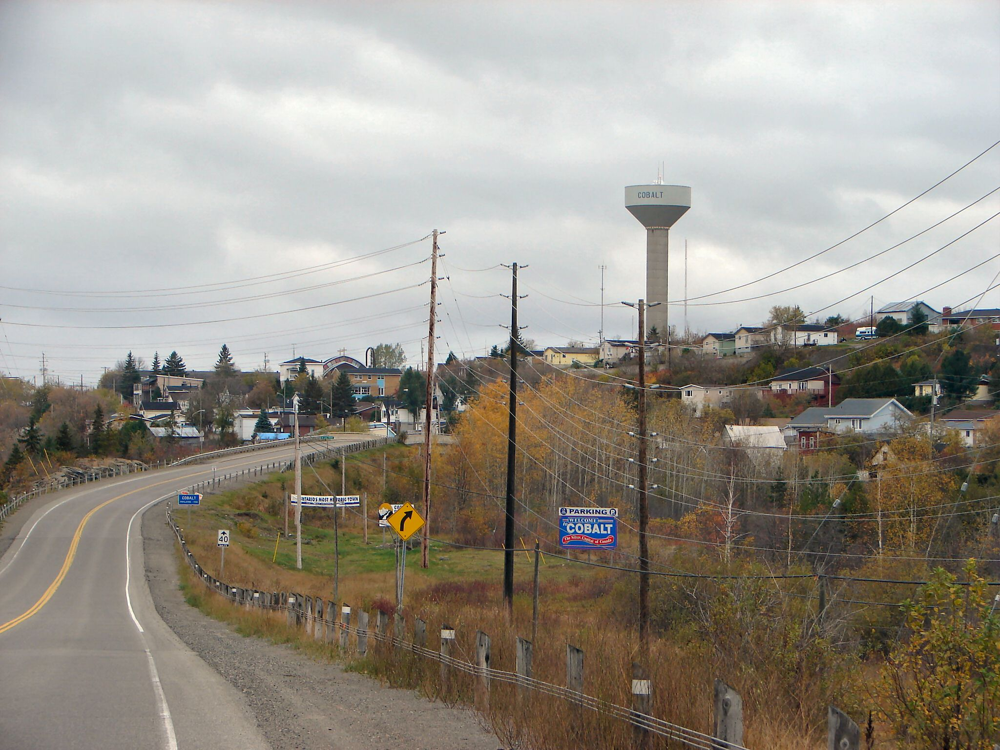 Cobalt, Ontario, Canada